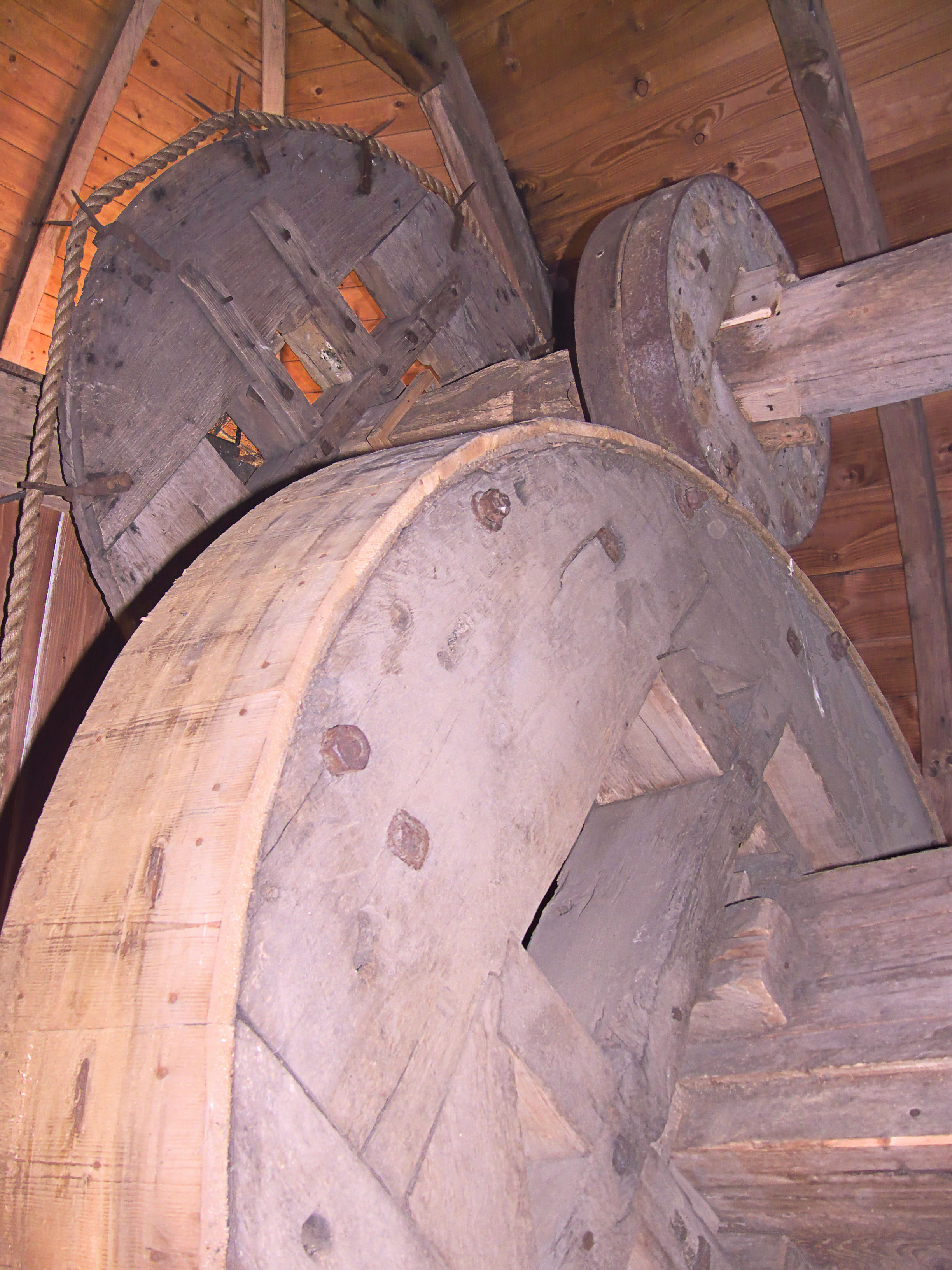 De Vlijt, Geffen, Netherlands; luiwerk